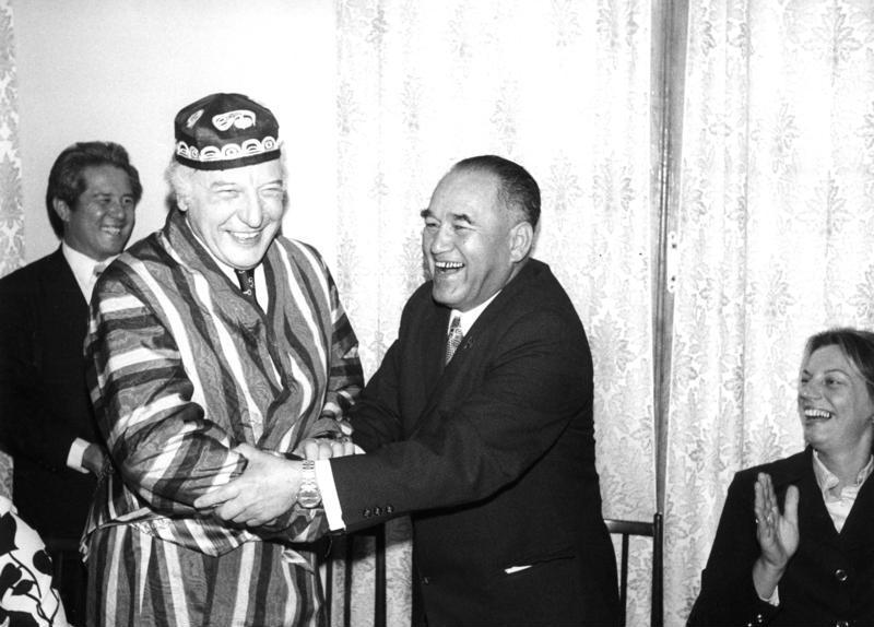 Staatsbesuch des Bundespräsidenten Walter Scheel in der UdSSR Auf Einladung des Vorsitzenden des Präsidiums des Obersten Sowjets, N.V. Podgorny, und Frau Podgornaja statteten Bundespräsident Walter Scheel und Frau Dr. Mildred Scheel vom 10. bis 15. November 1975 der UDSSR einen offiziellen Besuch ab. Es handelte sich hier um den ersten Besuch eines Präsidenten der Bundesrepublik Deutschland in der Sowjetunion. Während der ersten drei Tage hielt sich der Bundespräsident in Moskau auf, wo er mehrere Gespräche mit Staatsoberhaupt Podgorny führte. Er traf auch mit dem Generalsekretär der Kommunistischen Partei, Leonid Breschnew, zusammen. Auf dem Programm standen ferner Besichtigungen und kulturelle Veranstaltungen. Am vierten Tag seines Aufenthaltes in der UDSSR weilte Bundespräsident Scheel mit seiner Delegation in Taschkent, der Hauptstadt Usbekistans. Vor dem Rückflug am 15.11. von Taschkent aus stand die Besichtigung der 2.000 jährigen Stadt Samarkand auf dem Pogramm. Von dem Vorsitzenden der Exekutiv-Komitees des Gebiets-Sowjets von Samarkand, Herrn S.Ch. Chamrakulow (re.), erhielt Bundespräsident Scheel eine usbekische Tracht.